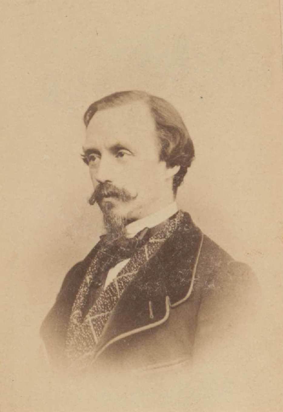 Retrato de Pedro de Madrazo y Kuntz por J. Laurent. Fotografía en papel de albúmina; álbum de retratos de Hartzenbusch. Biblioteca Nacional de España